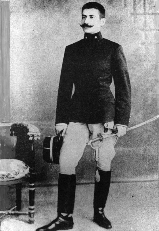 Захариас Пападас (?-1907)